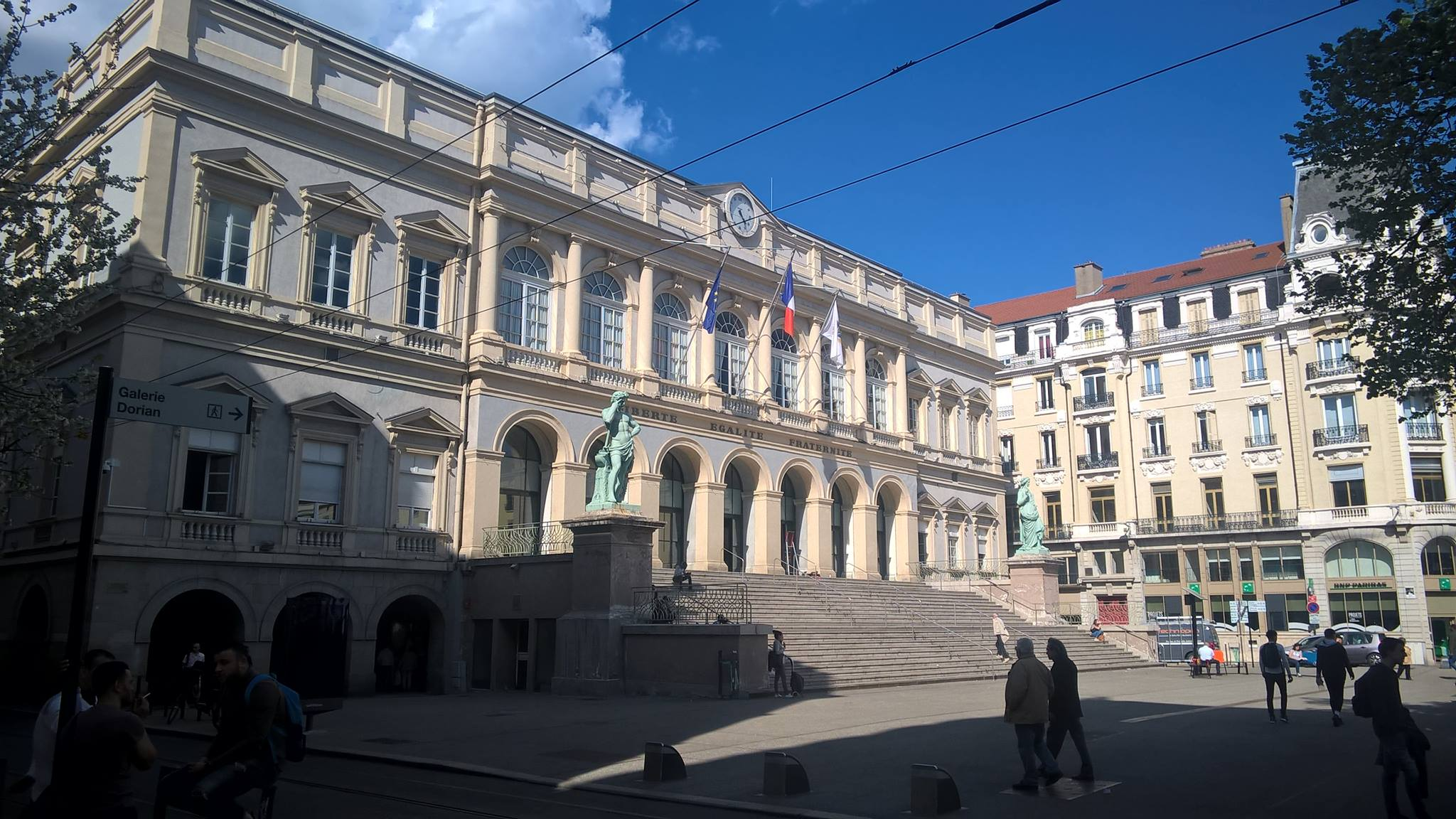 L'hôtel de ville de Saint-Etienne au printemps 2017.